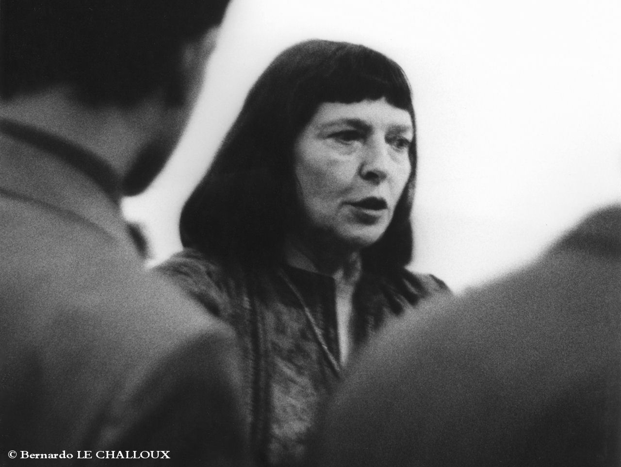 Monique MORELLI est une grande interprète d'ARAGON. Elle a mis "l'Affiche Rouge" (Musique de Léo FERRÉ) à son répertoire. Elle participe à cette présentation de "La messe d'Elsa", su 19 au 25 juin 1981.